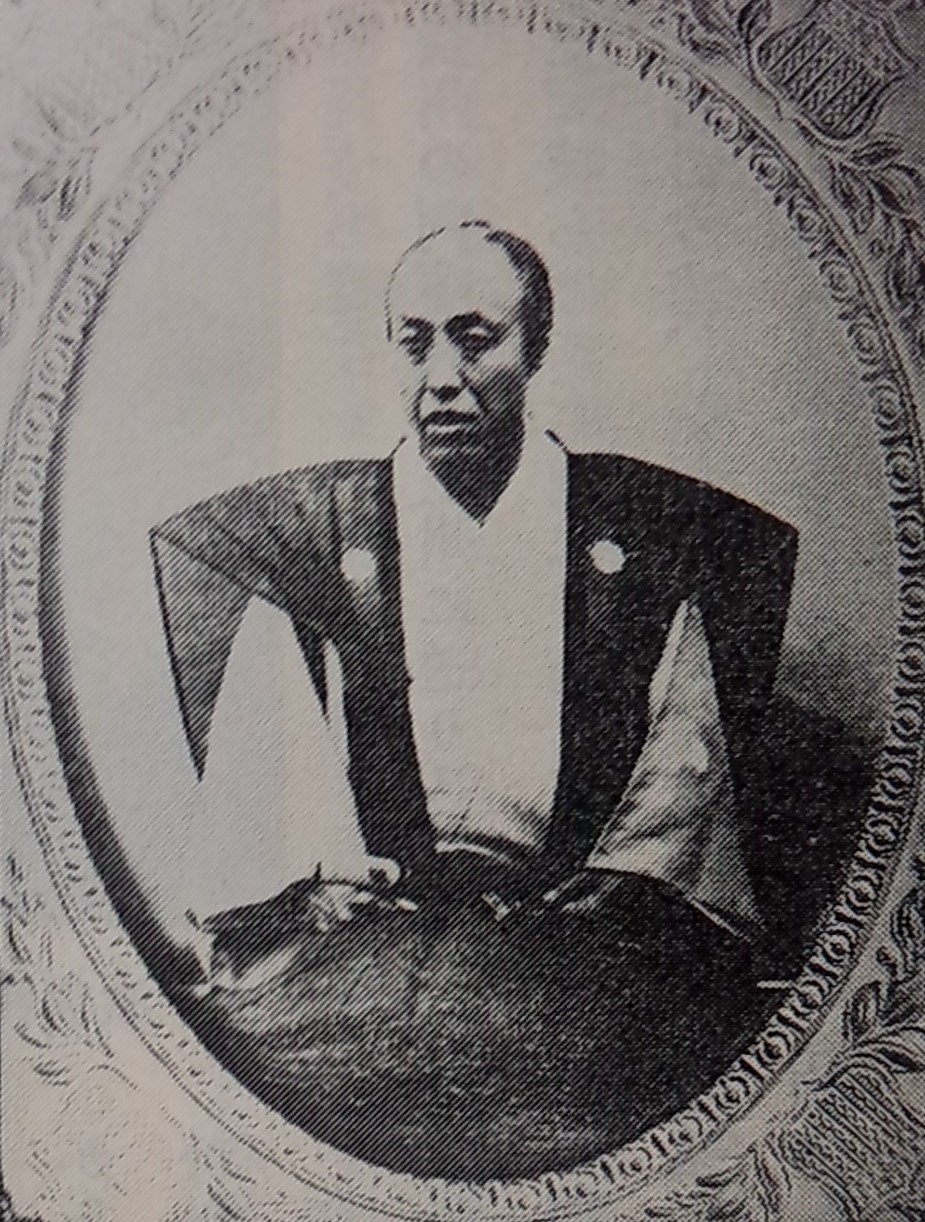 小幡藩主・松平忠恕の肖像写真。